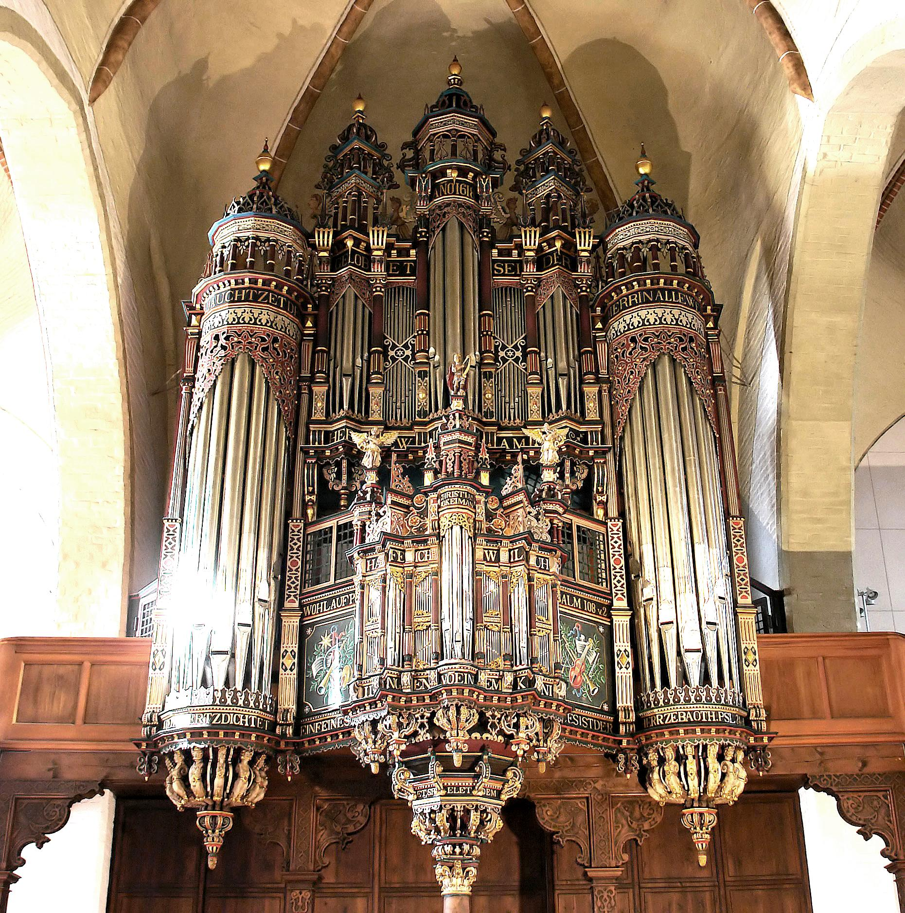 St.Martini-Kirche in Bremen. Orgelprospekt von 1619